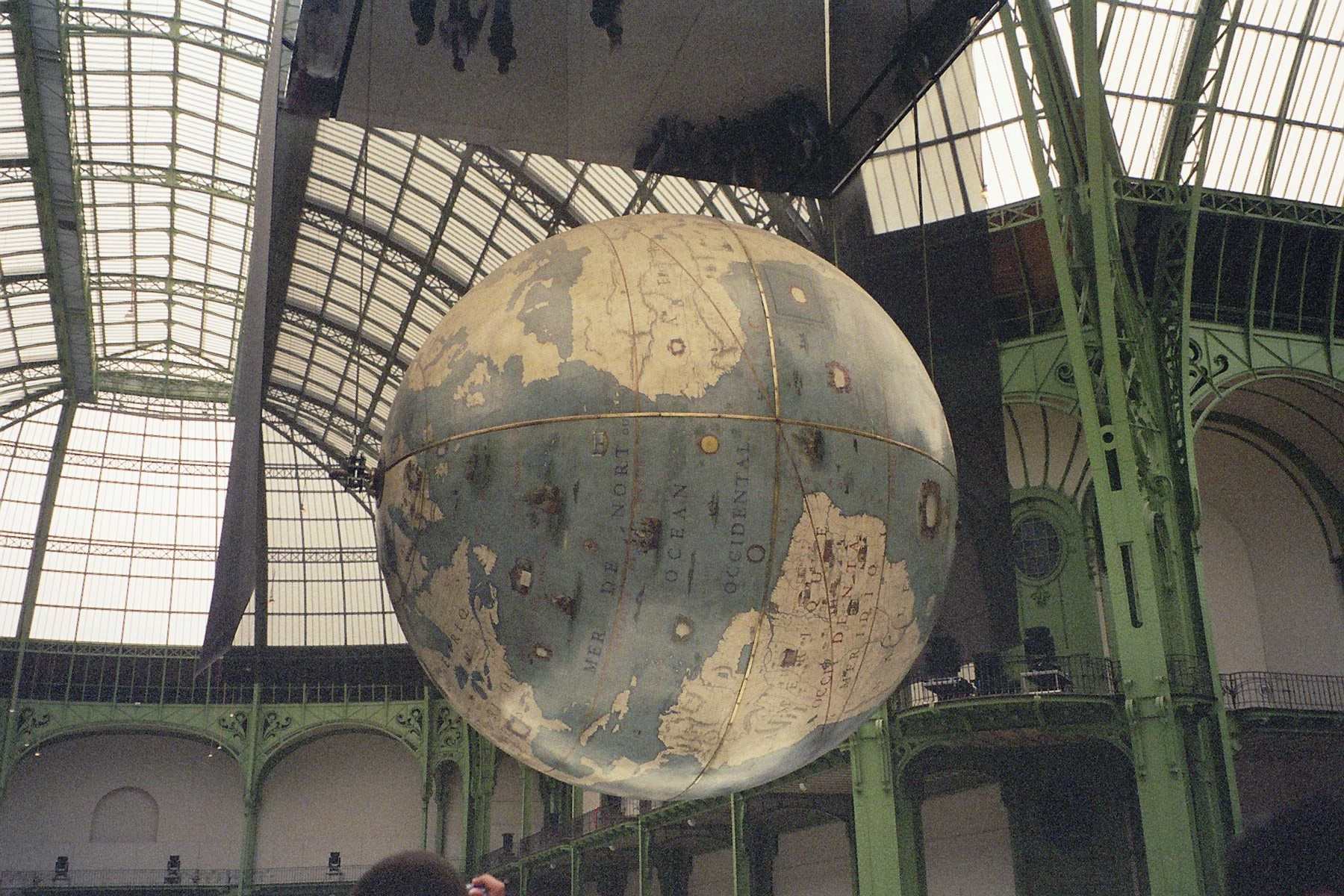 Grand Palais, Paris, France